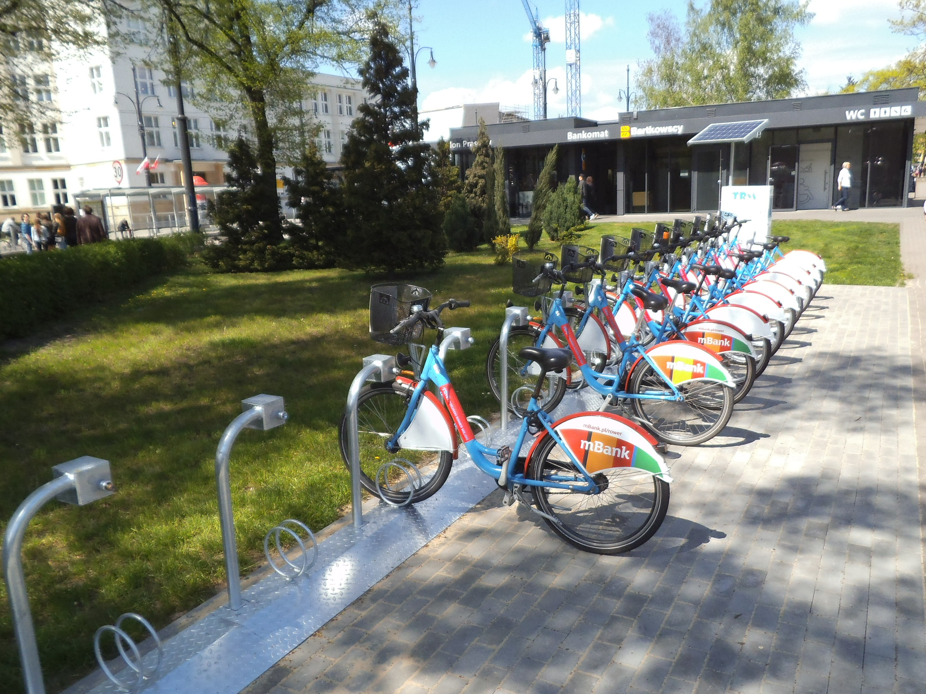 TRM w Toruniu